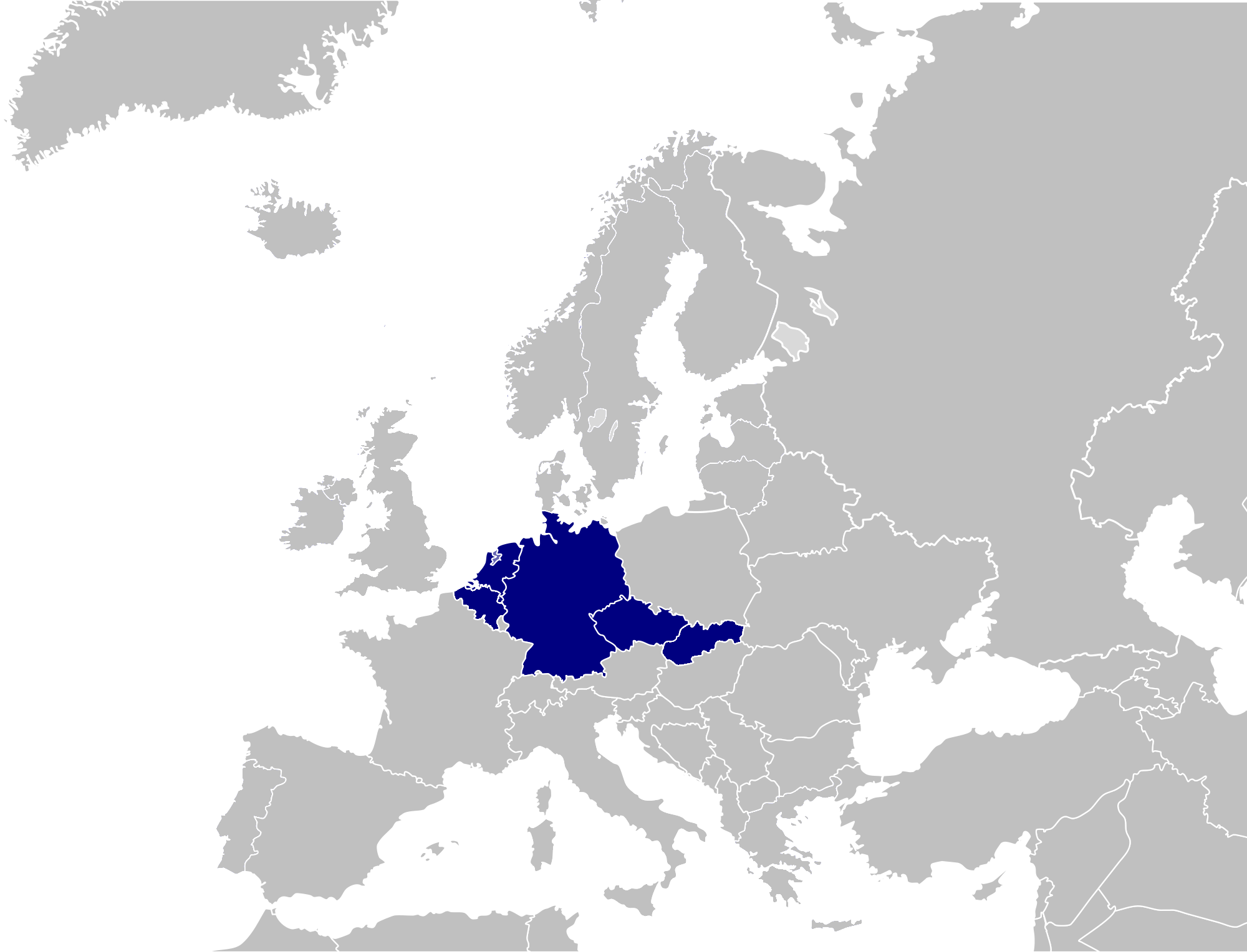 Carte des pays où la marque d'AH Basic (avant Euro Shopper) est active.